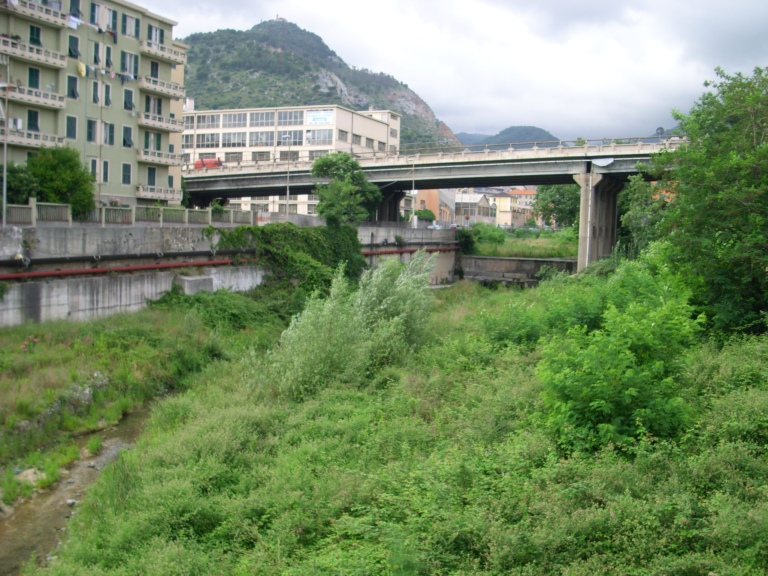 Il torrente Chiaravagna, con il cavalcavia dell'autostrada e sullo sfondo il monte Gazzo, Sestri P., Genova